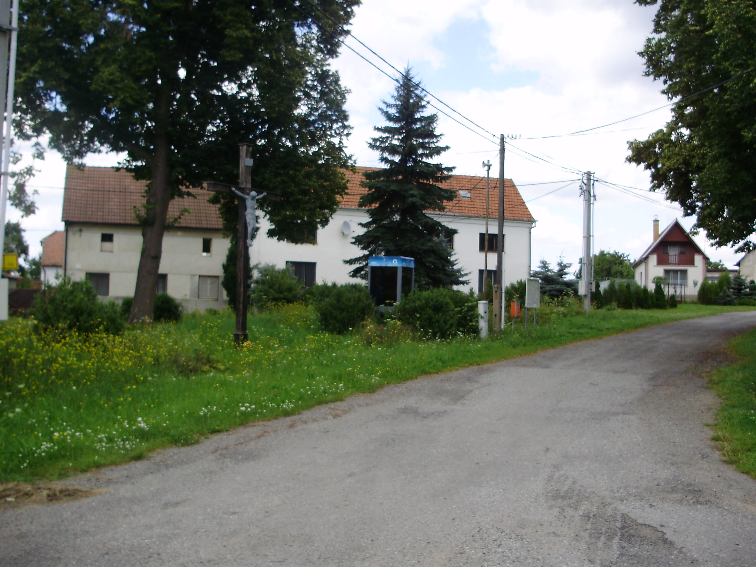 Náves Odrůvky(Vyškov- Czech republic)